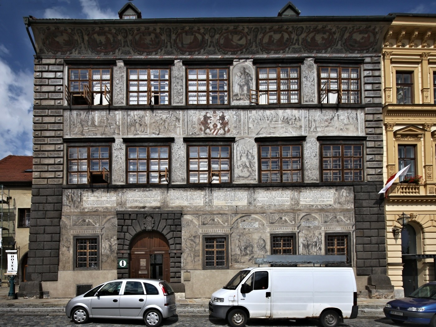 Renesanční radnice byla vystavěna v letech 1570-1571 na místě předpokládaného rožmberského zámečku. Na stavbě se podíleli vlašští stavebníci, výzdobu prováděl malíř Jan Březnický. Již v době svého vzniku byla stavba zcela vyjimečnou. Malba byla provedena metodou chiaroscura a je jedinou tohoto druh